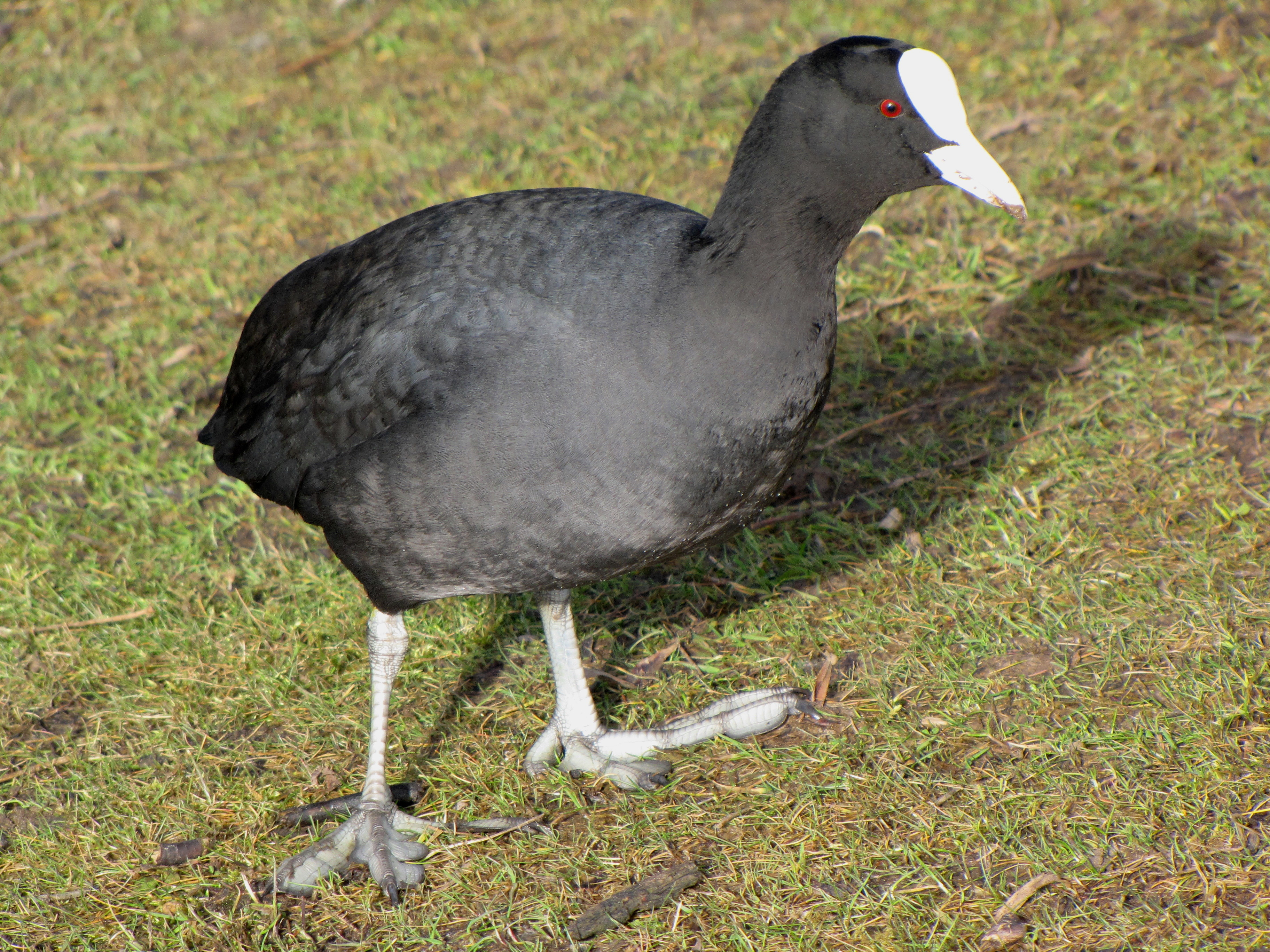 Fulica atra, UK.